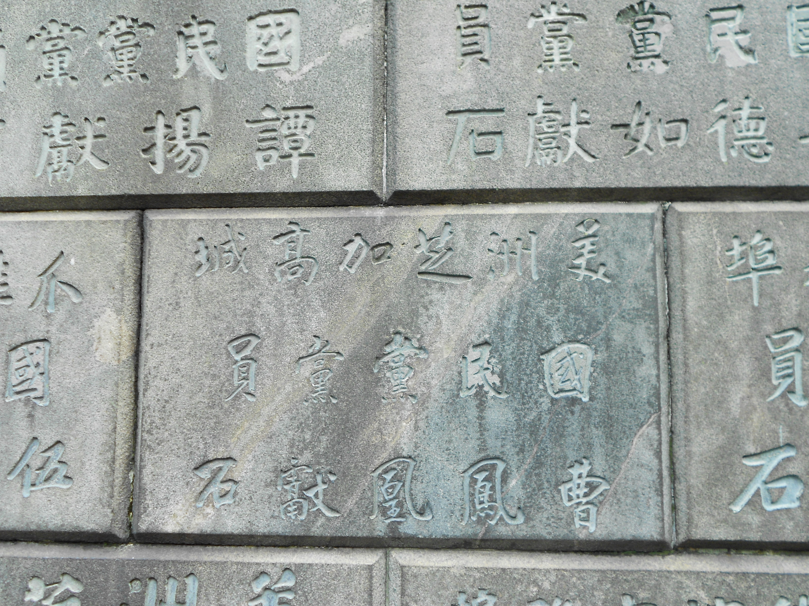 中國國民黨海外黨員獻石